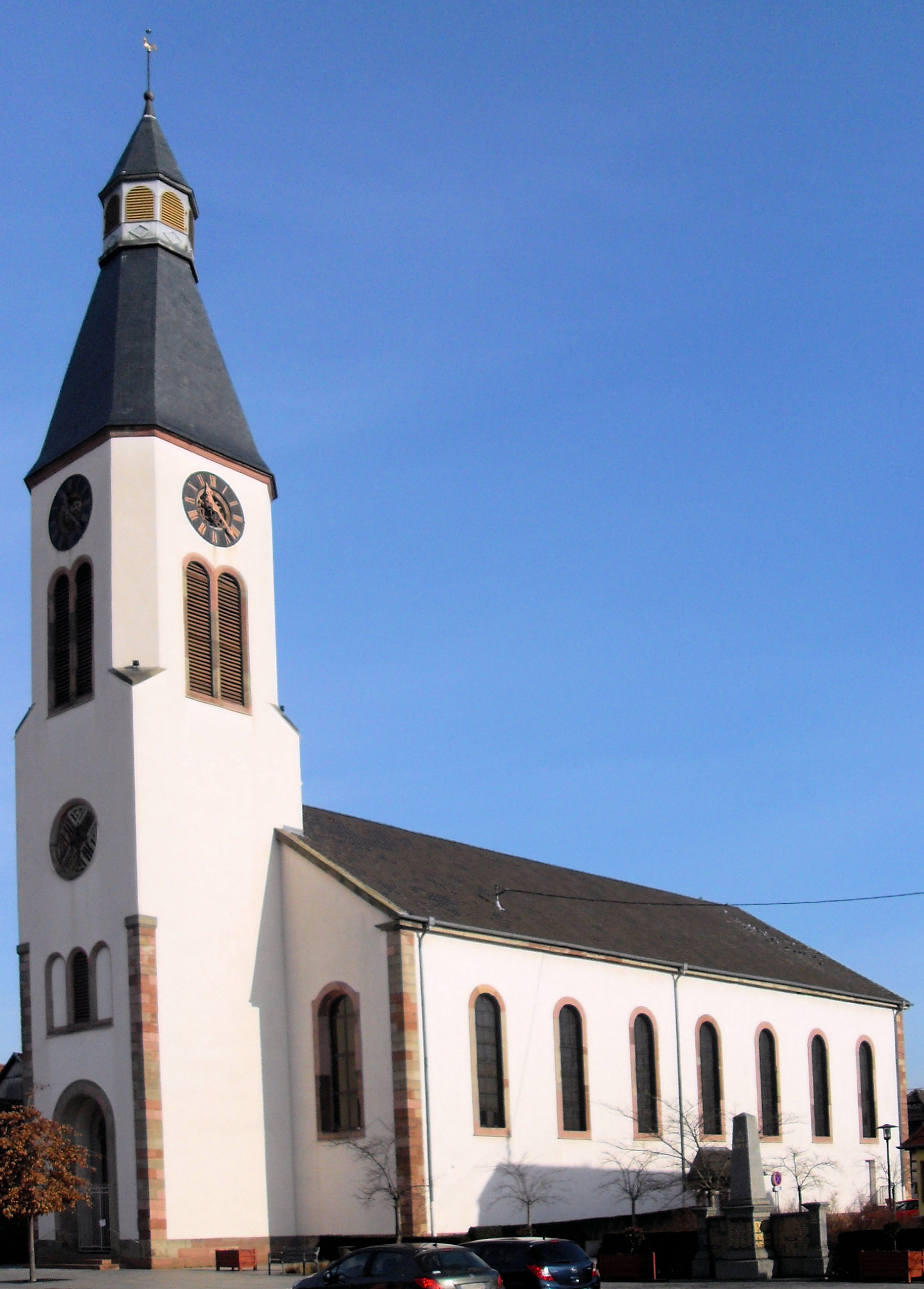 Le temple Protestant de Hœrdt